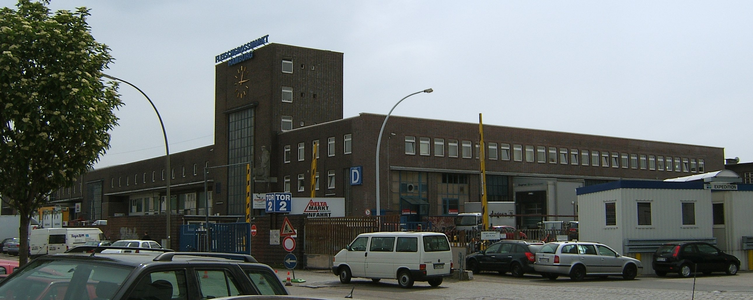 Eingangsgebäude des Fleischgroßmarktes (und früheren Schlachthofes) an der Lagerstraße in Hamburg-St. Pauli.